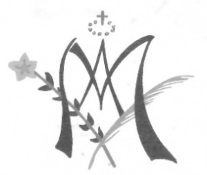 Emblema de las Esclavas de María Inmaculada, congregación formada por Juana M. Condesa en 1884